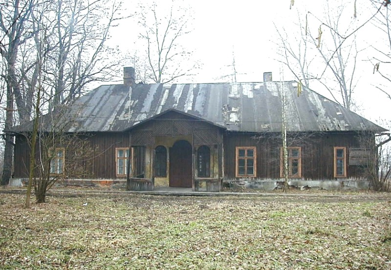 "Wielki dwór" - Frydrychowice zdjęcie wykonana przeze mnie wiosną 2002 roku --Michał 20:54, 16 lis 2004 (CET)